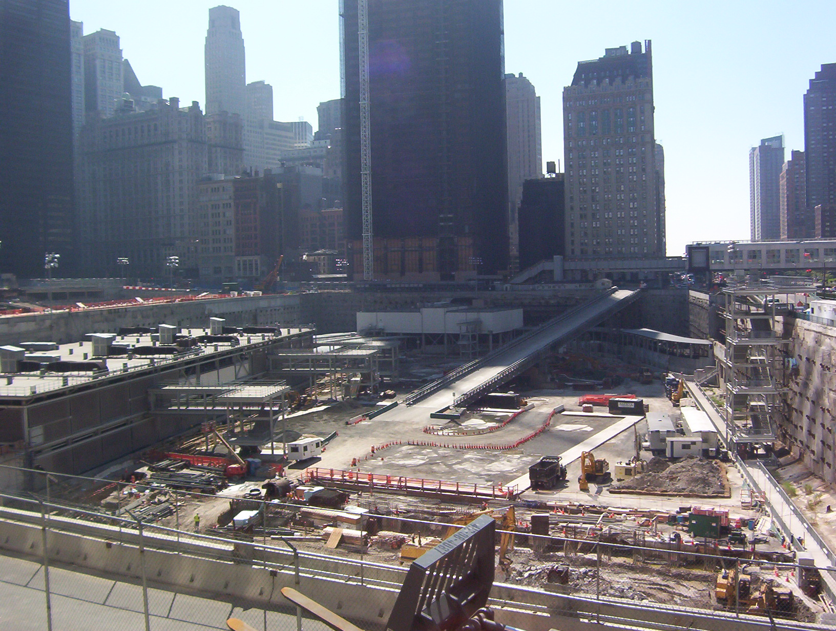 Ground Zero, picture taken Oct-08-2006 Zona Cero, tomada el 8-oct-2006 Maximo 22 - 09 2009